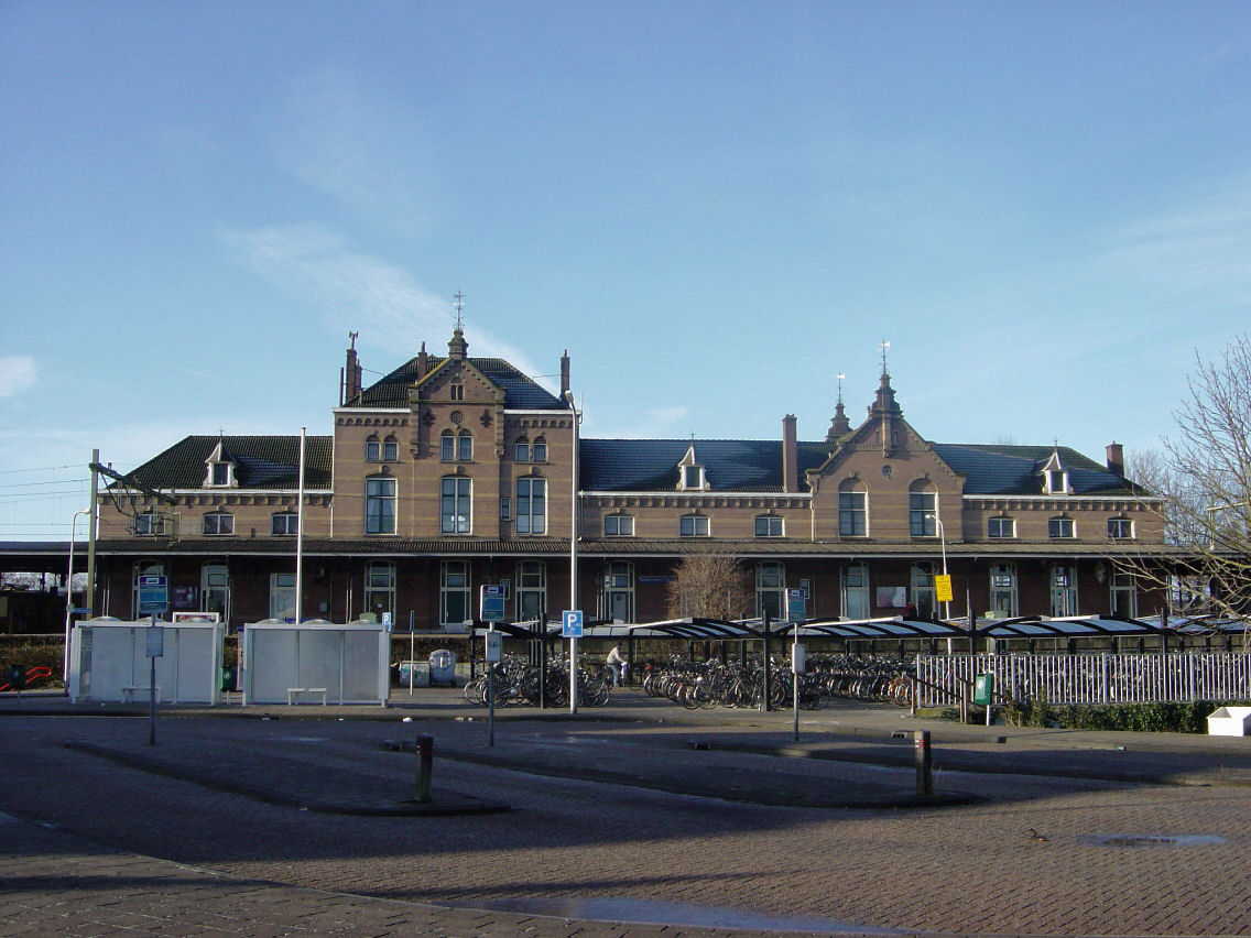 Station Geldermalsen aan de MerwedeLingelijn. Zicht op stationsgebouw en voorplein.